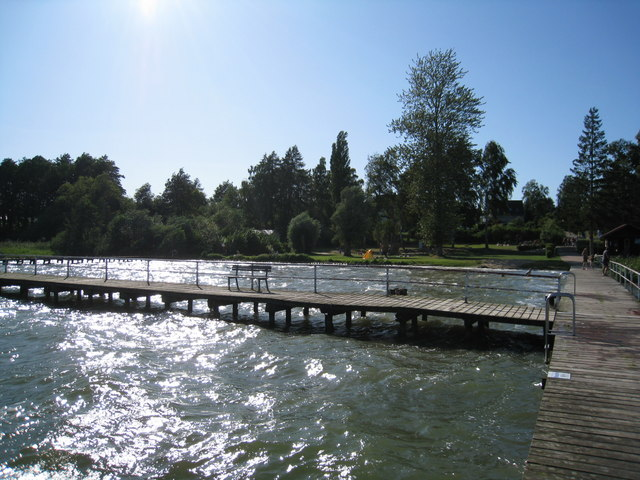 Freibad